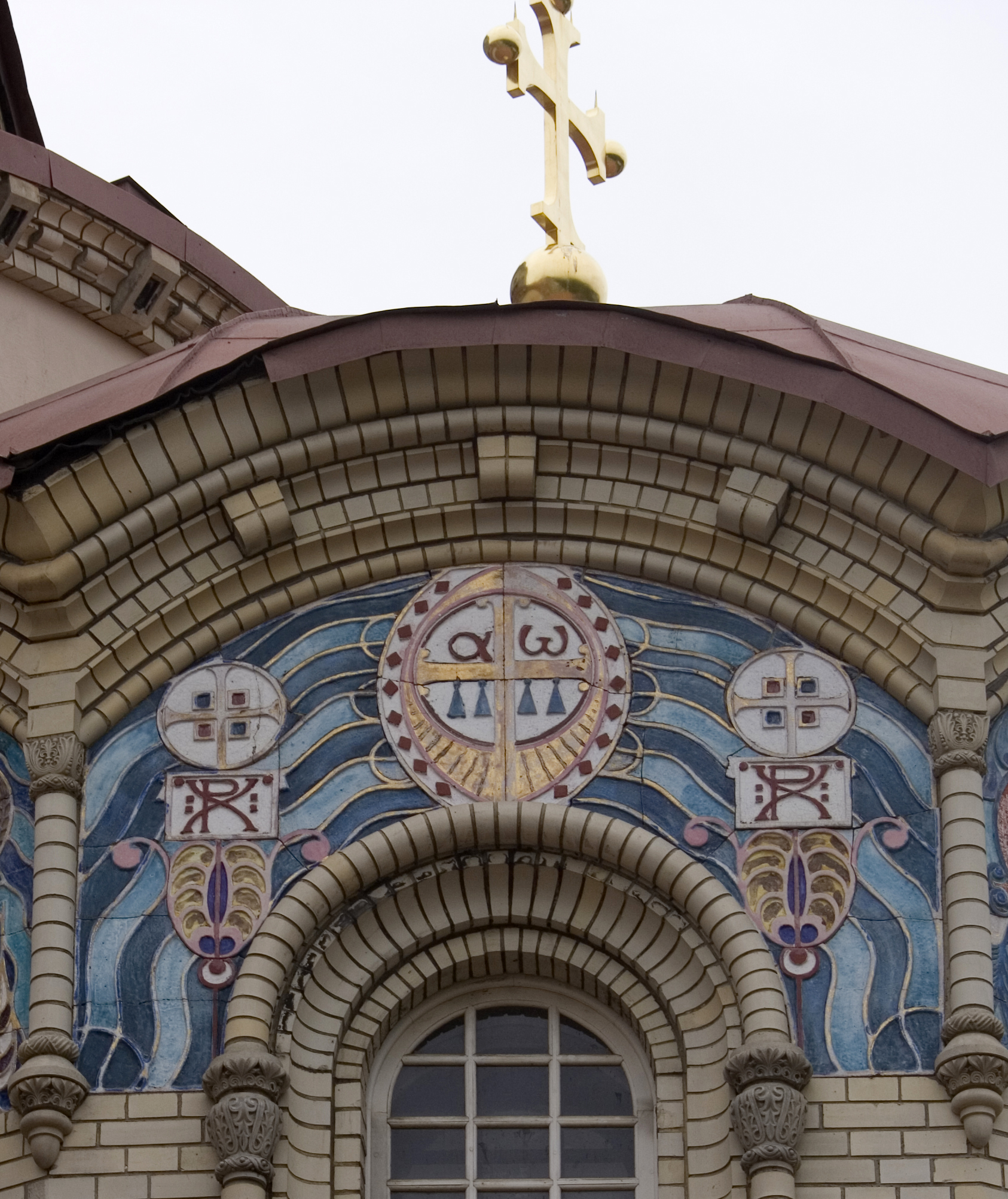 Казанская церковь в Новодевичьем монастыре